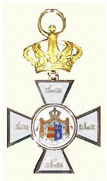 Grootkruis Huis-en Verdienste Orde